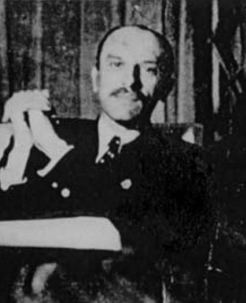 Cyryl Czarkowski-Golejewski (1885-1940)